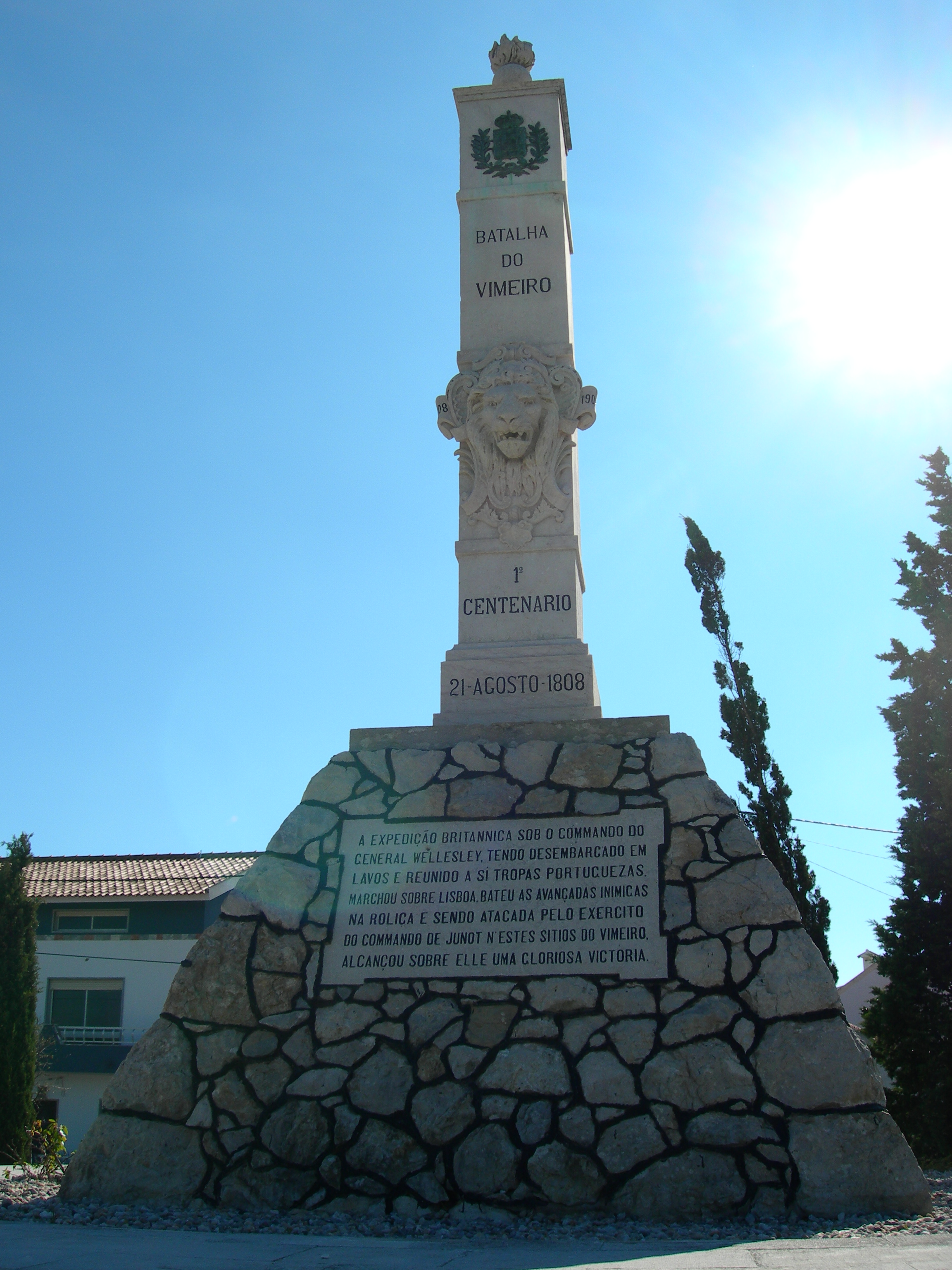 Padrão do Vimeiro This file was uploaded for Wiki Loves Monuments in Portugal with the unique identifier 74716.